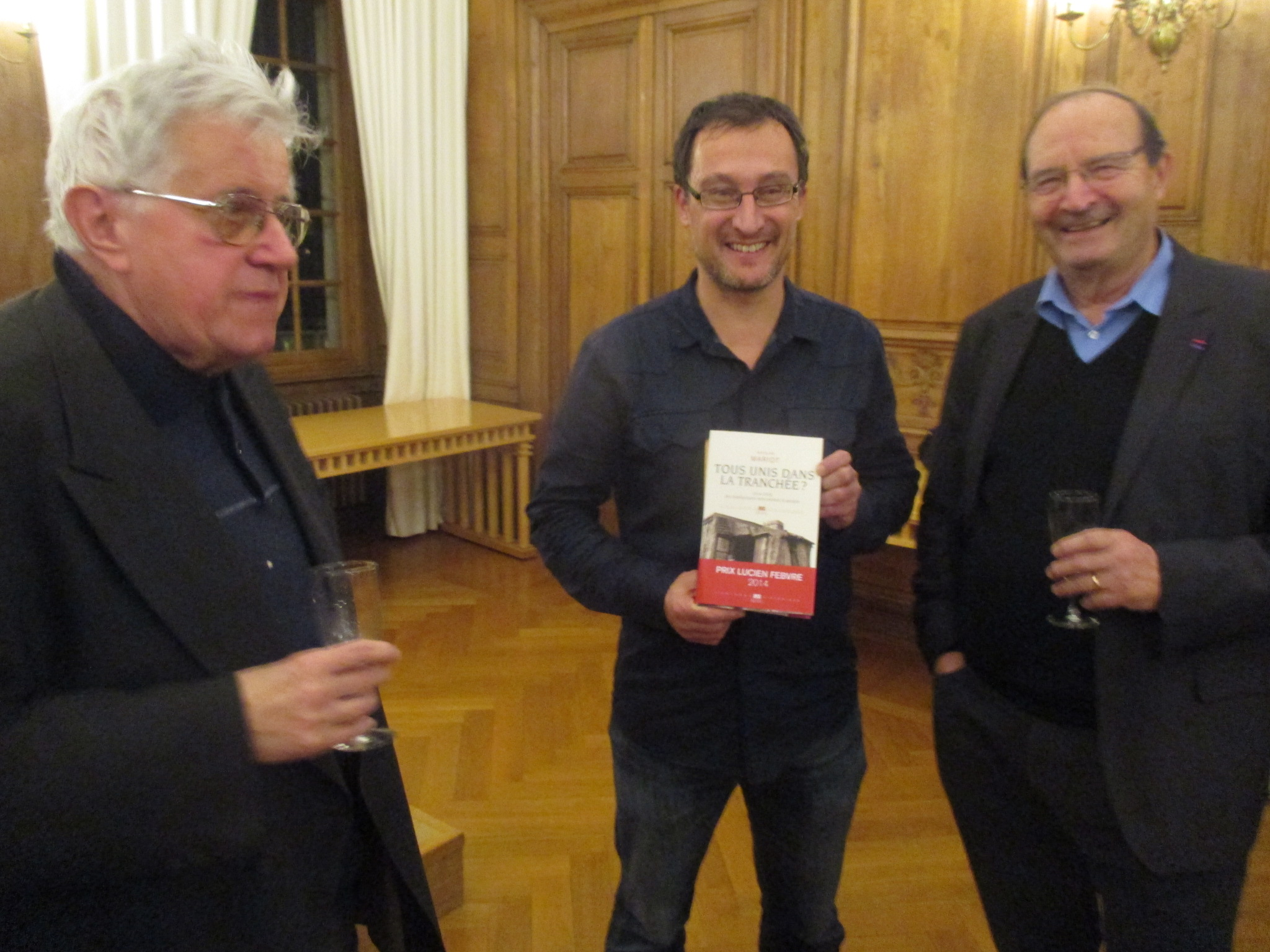 Association du livre et des auteurs comtois, remise des prix Marcel-Aymé et prix Lucien-Febvre en 2014. De Gauche à droite : Joseph Pinard, Nicolas Mariot et Michel Vernus